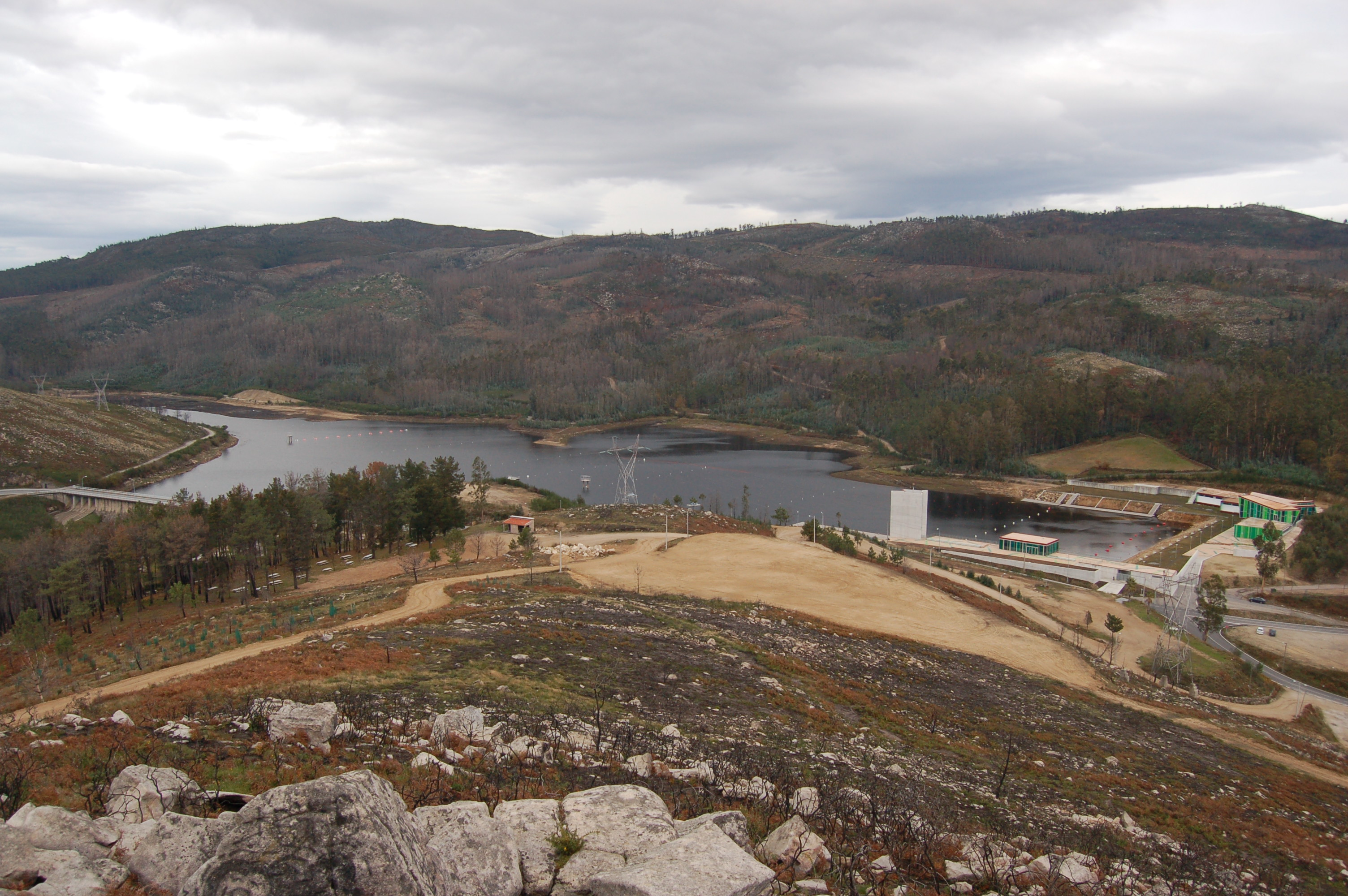 Encoro de Pontillón de Castro, na parroquia de Verducido, Pontevedra, no concello de Pontevedra,Galicia